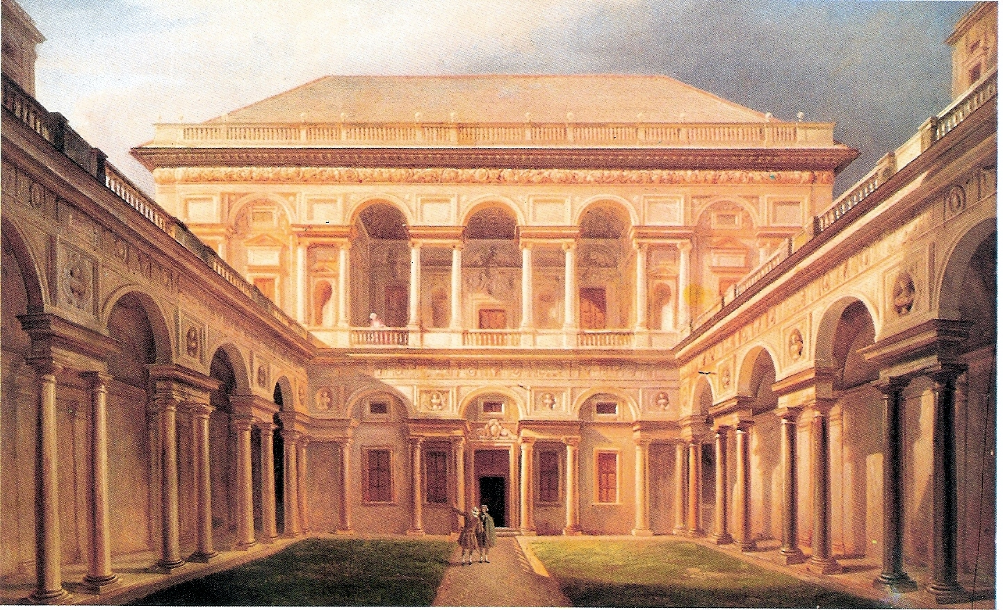 Dipinto di Domenico Cambiaso raffigurante la Villa Grimaldi-Sauli